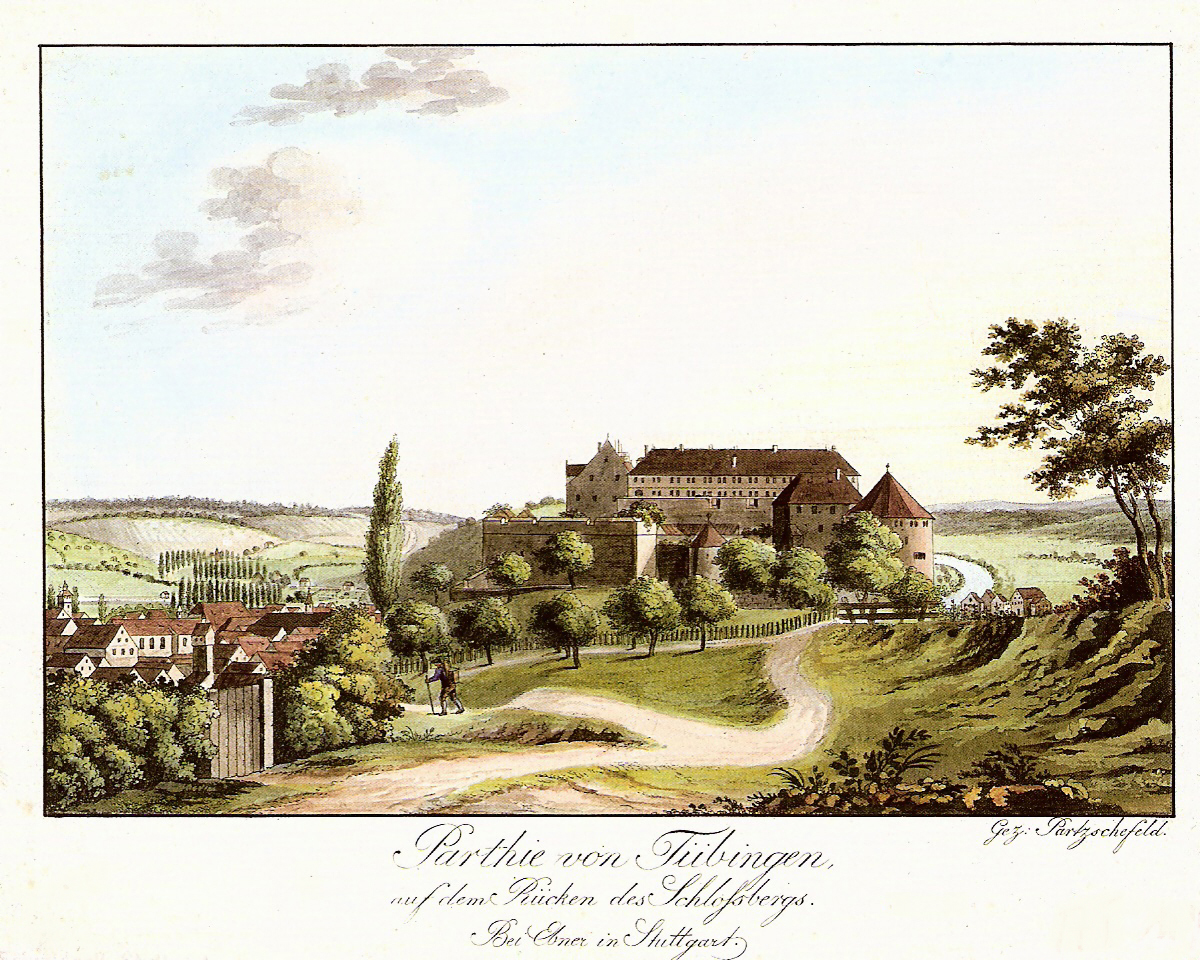 Auf dem Rücken des Schlossbergs (aquarellirte Radierung, Blatt 24,5×29,0 cm); Schefold 9412